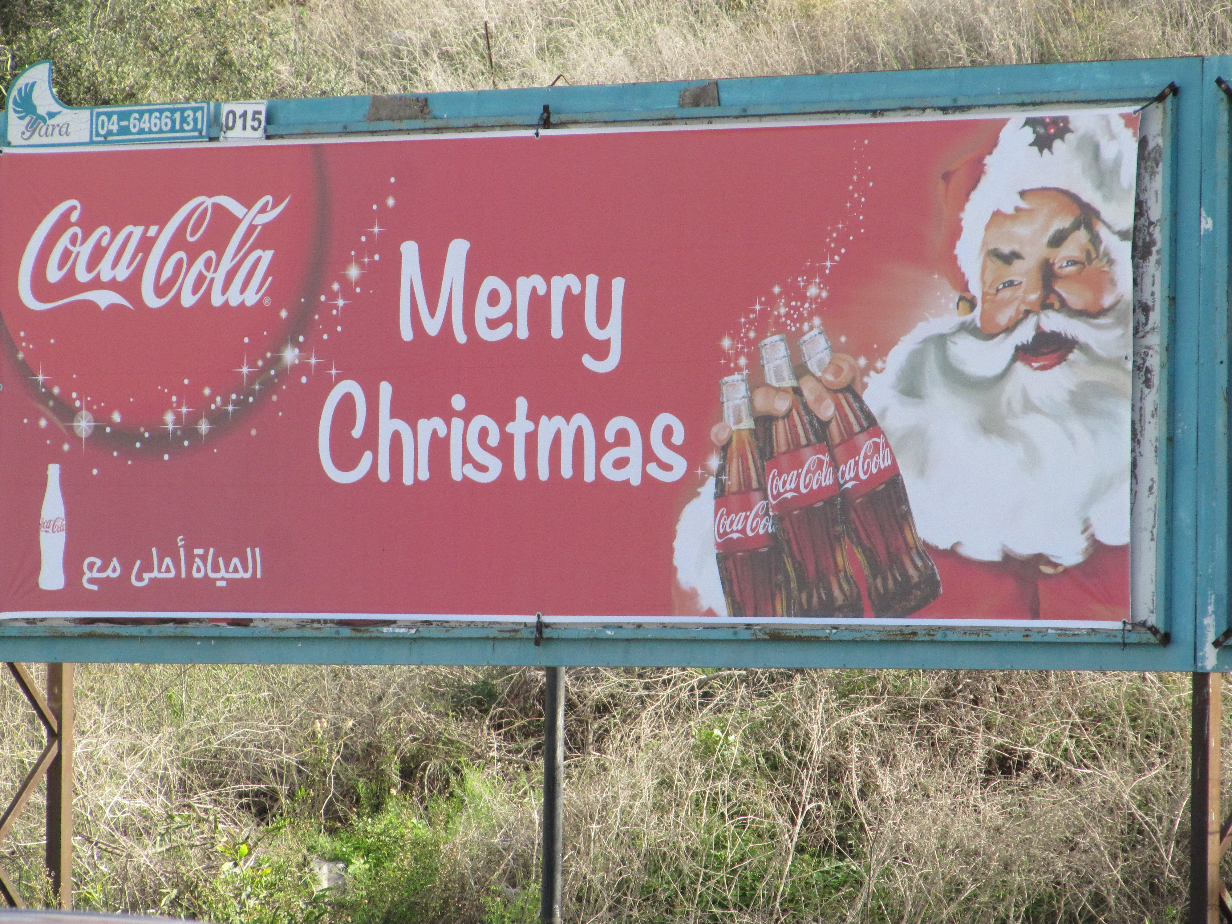 חג המולד בנצרת